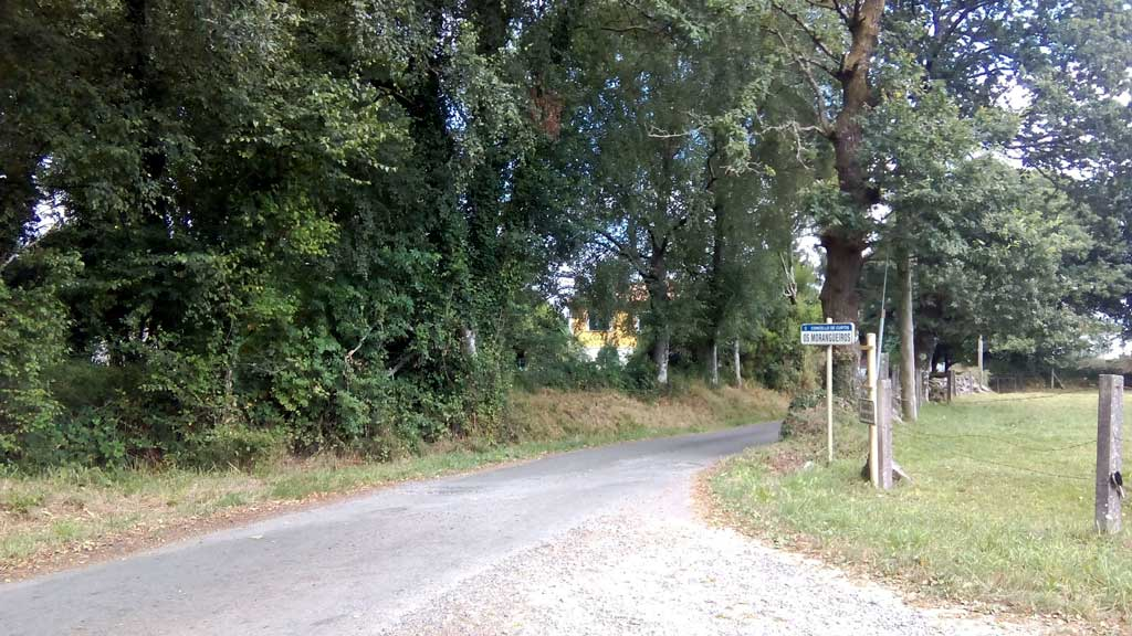 Vista dos Morangueiros, Curtis.